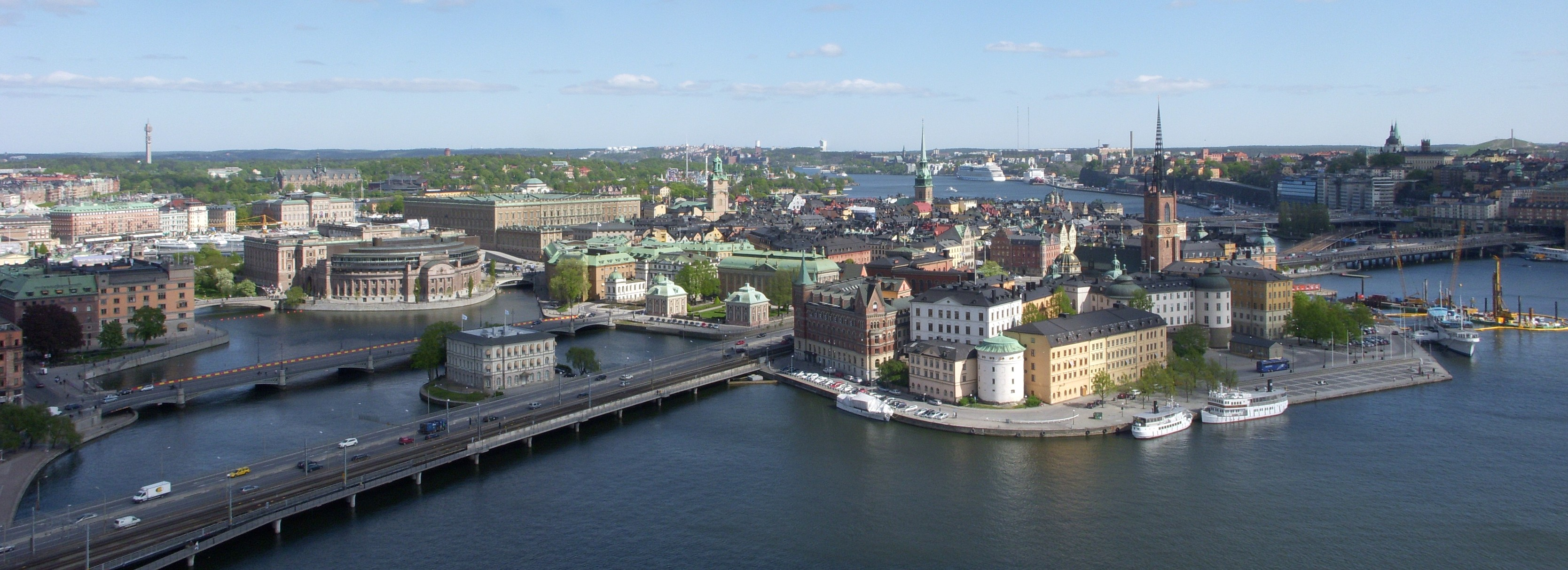 Panorama mot öst från Stockholms stadshus